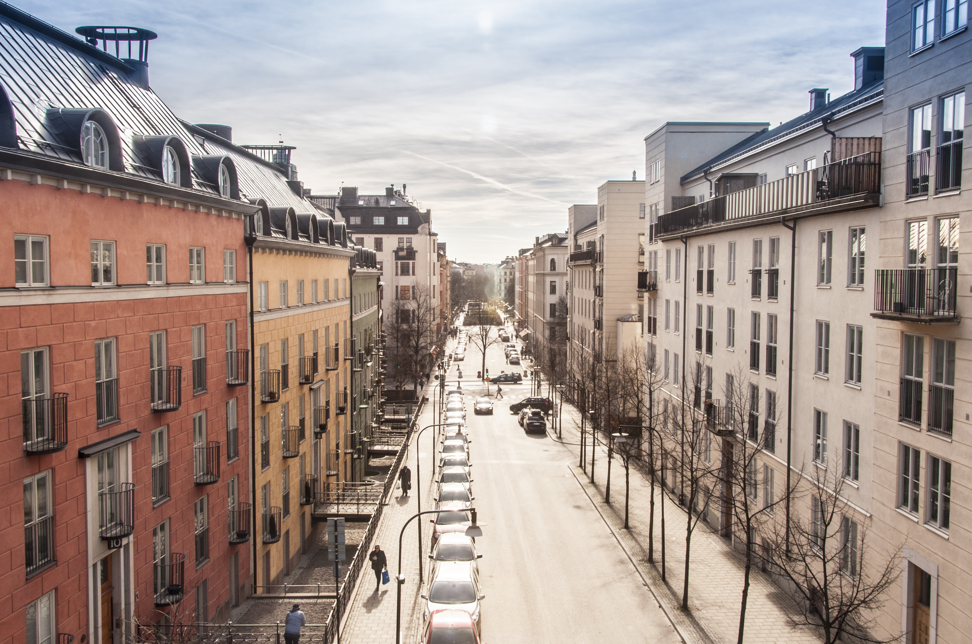 Sankt Eriksområdet utmed Carl Gustaf Lindsteds gata